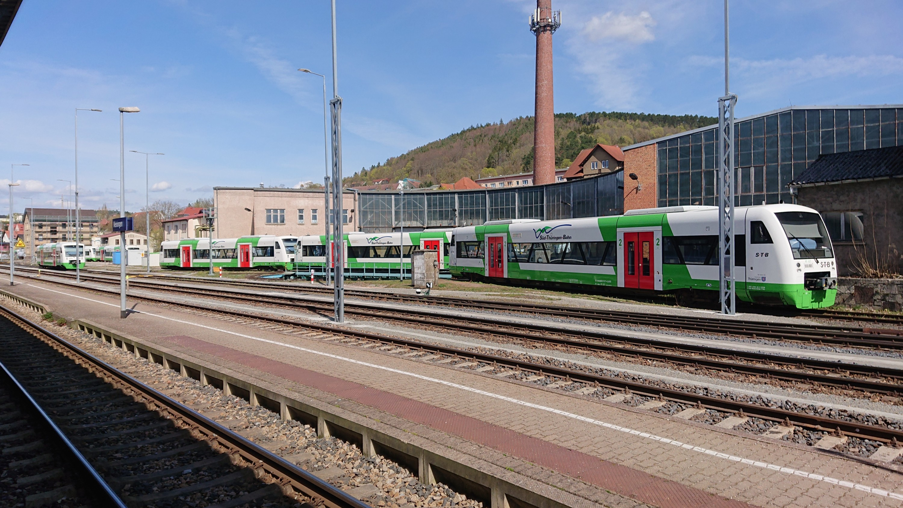 Abgestellte Shuttles der Südthüringenbahn an ihrem Betriebsstandort im Bahnhof Meiningen 2020.